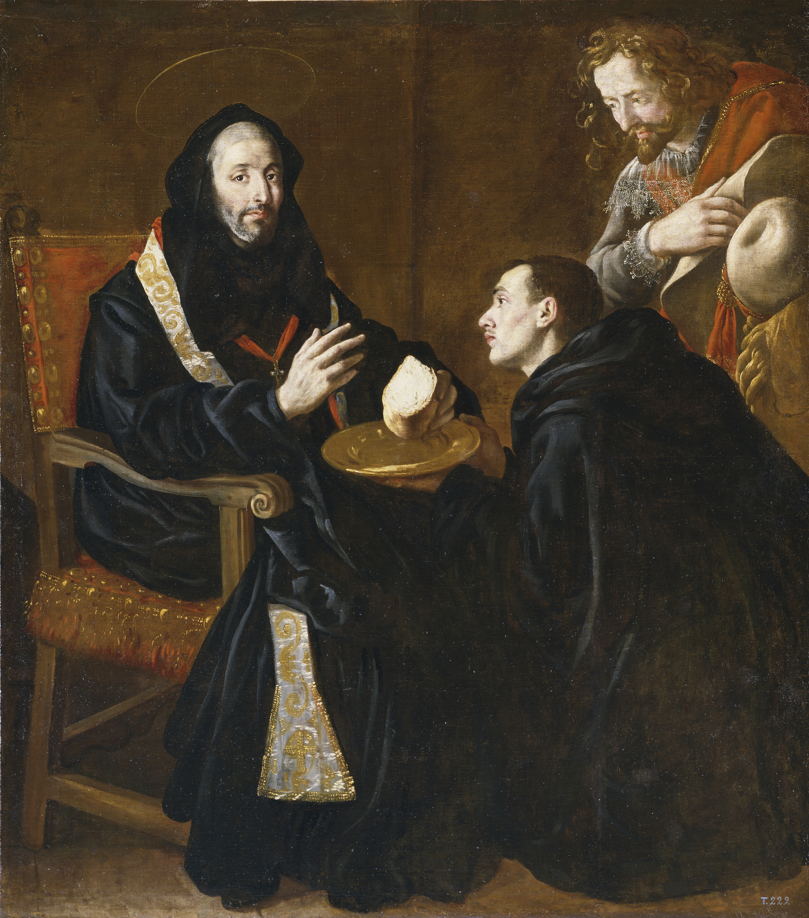 La obra representa a San Benito de Nursia, fundador de la Orden de los benedictinos, bendiciendo el pan.